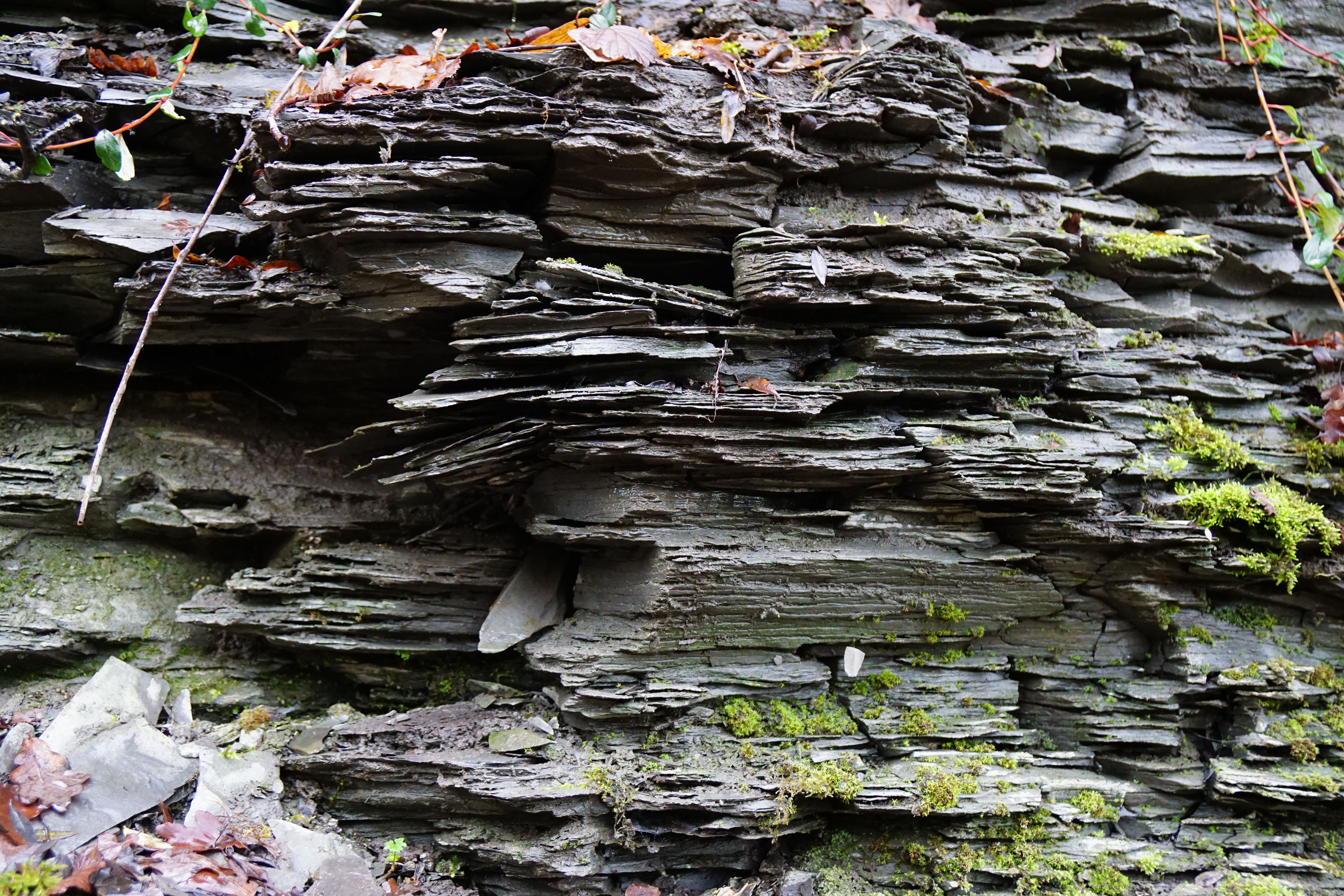 La mine de schiste de Creveney.